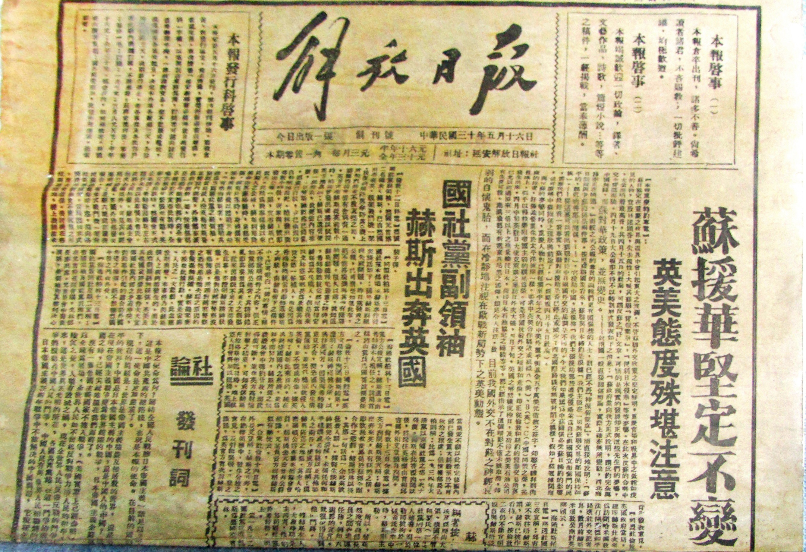 收藏于无锡博古故居内的《解放日报》创刊号，1941年5月16日。